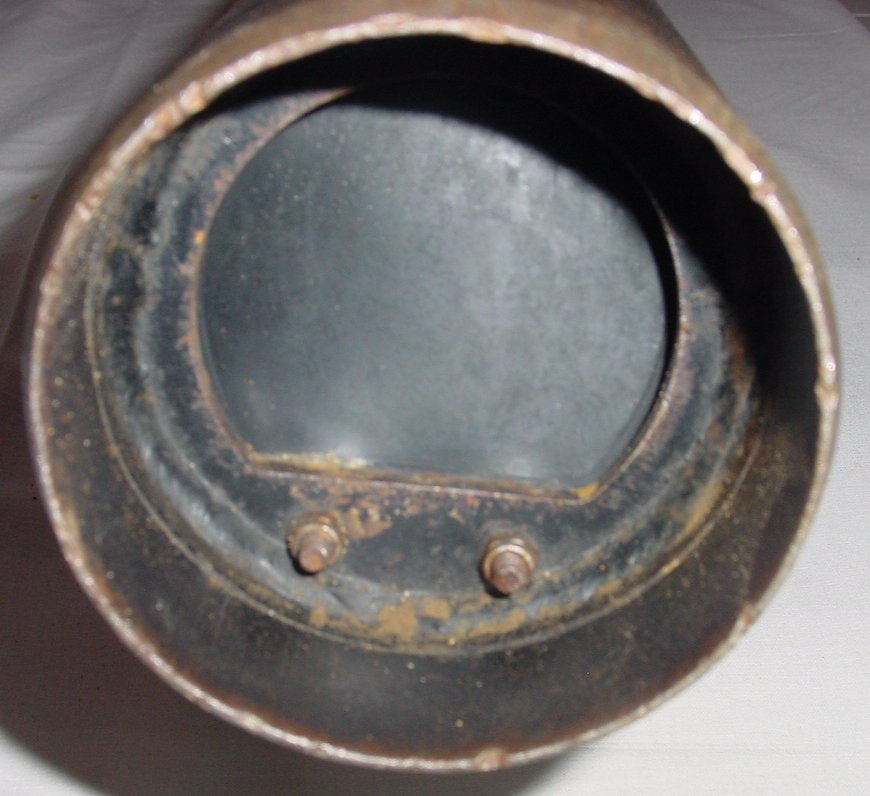 Ventilklappe einer Kiespumpe aus Gummi mit Glasfasereinlage in die Kiespumpe geschraubt.